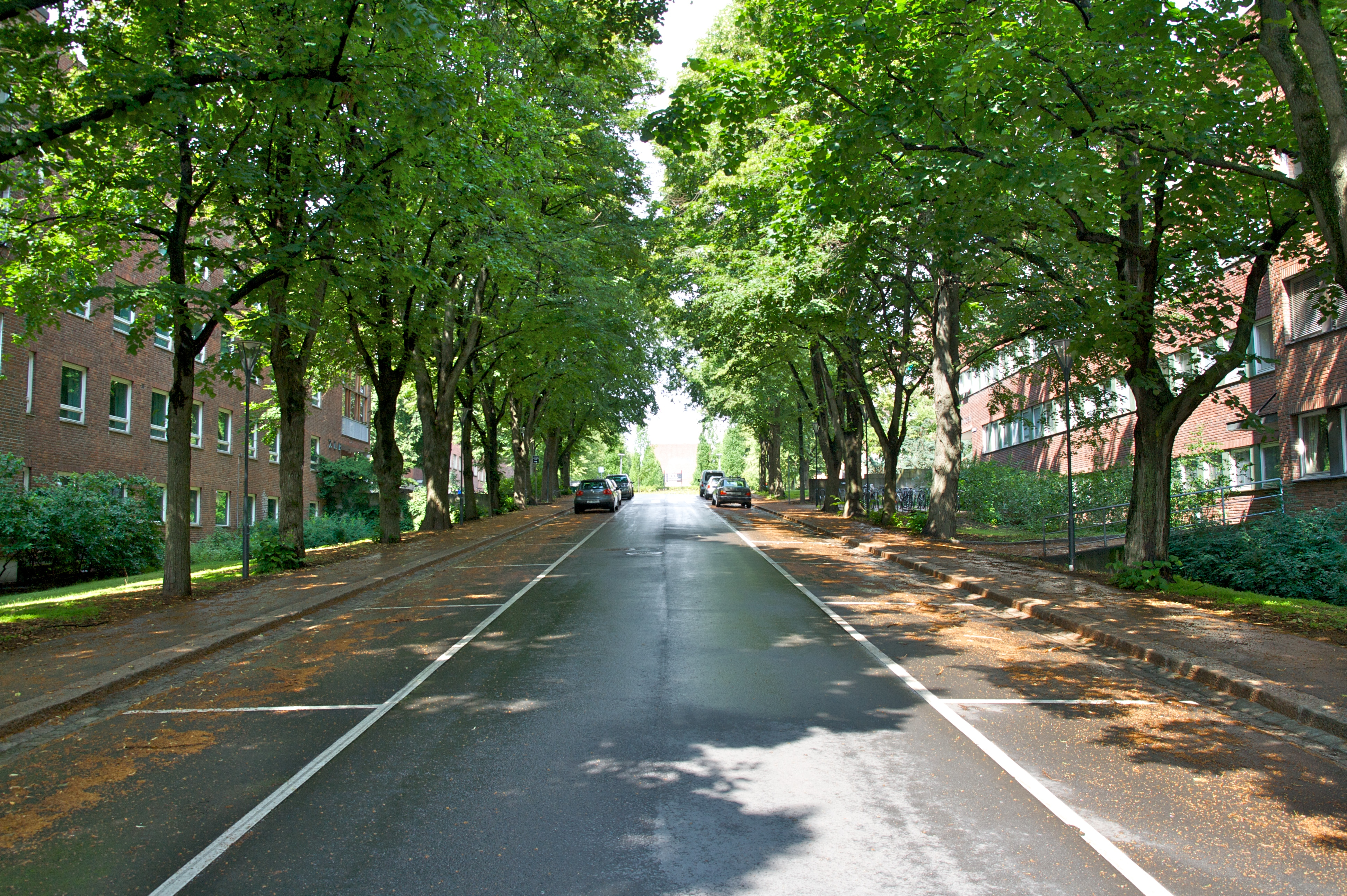 Sem Sælands vei. Blindern i Oslo.